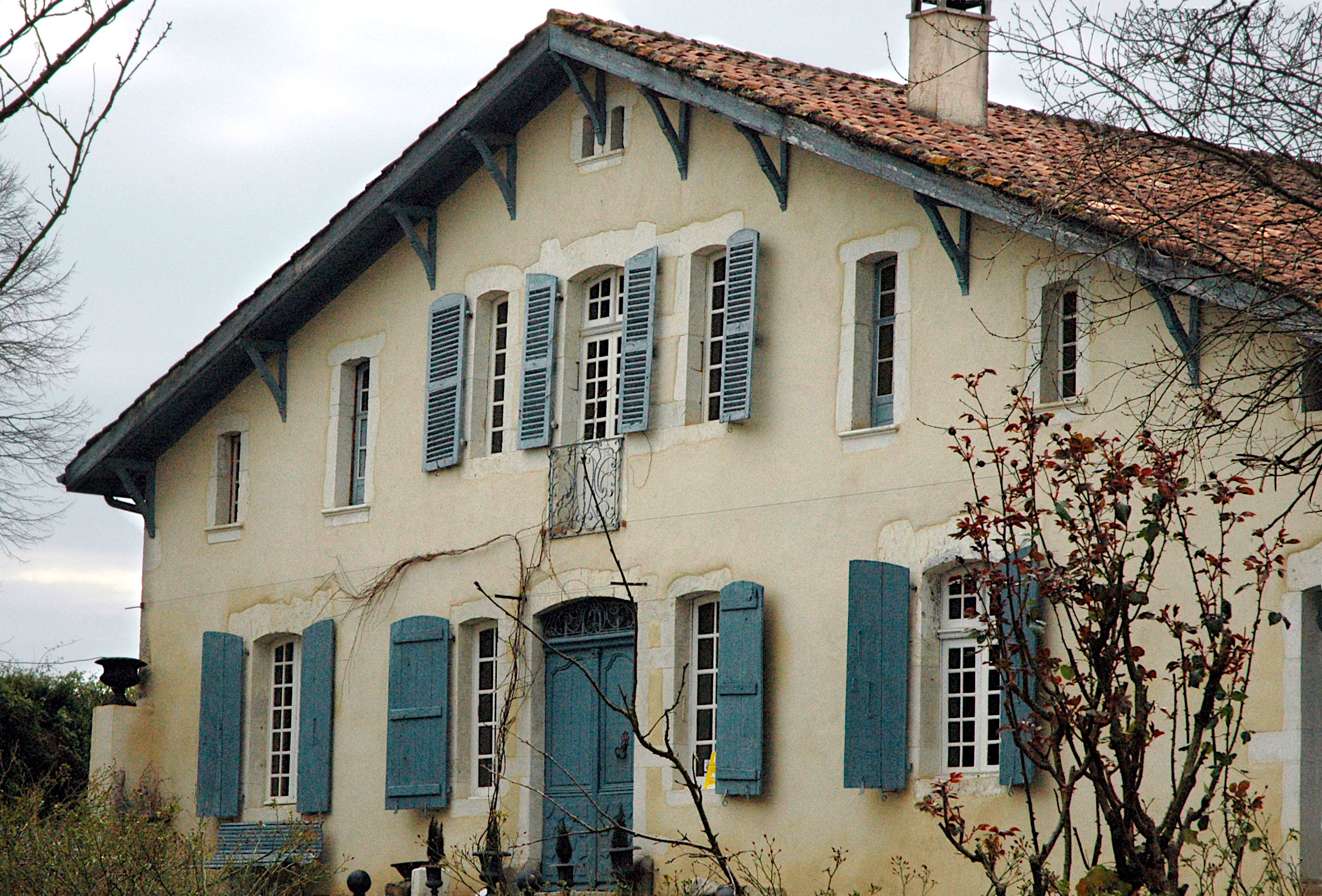 Maison capcazalière, Pachiou à Mimbaste